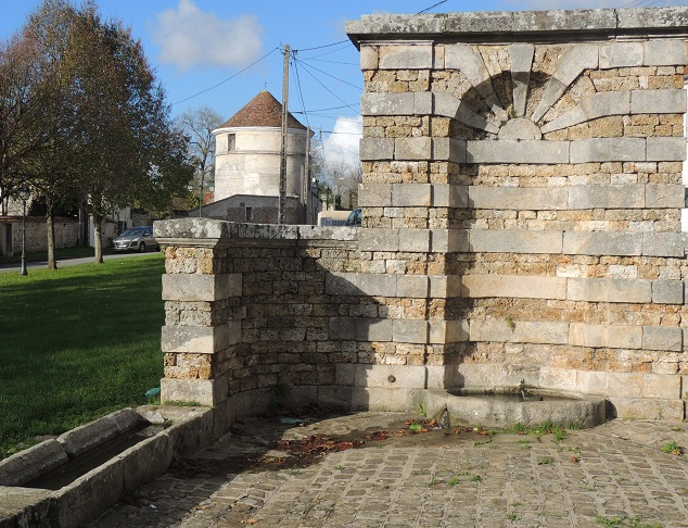 Colombier de Mauperthuis, derrière la fontaine du premier plan